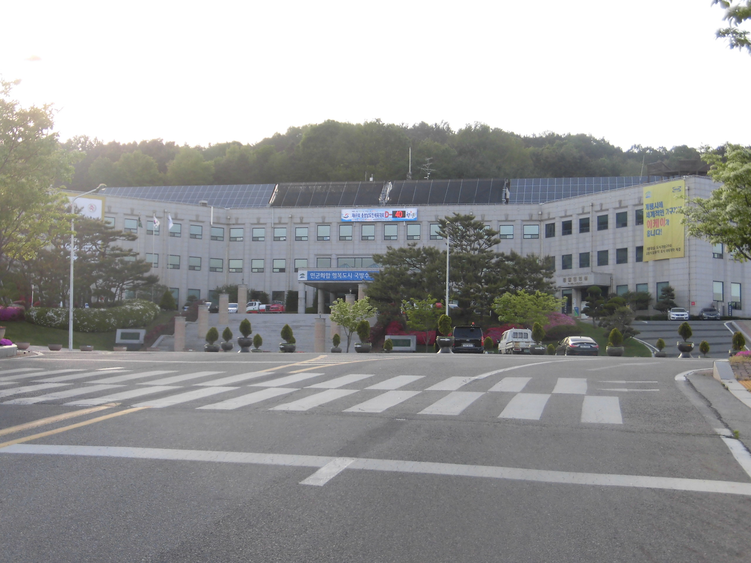 충청남도 계룡시에 있는 계룡시청